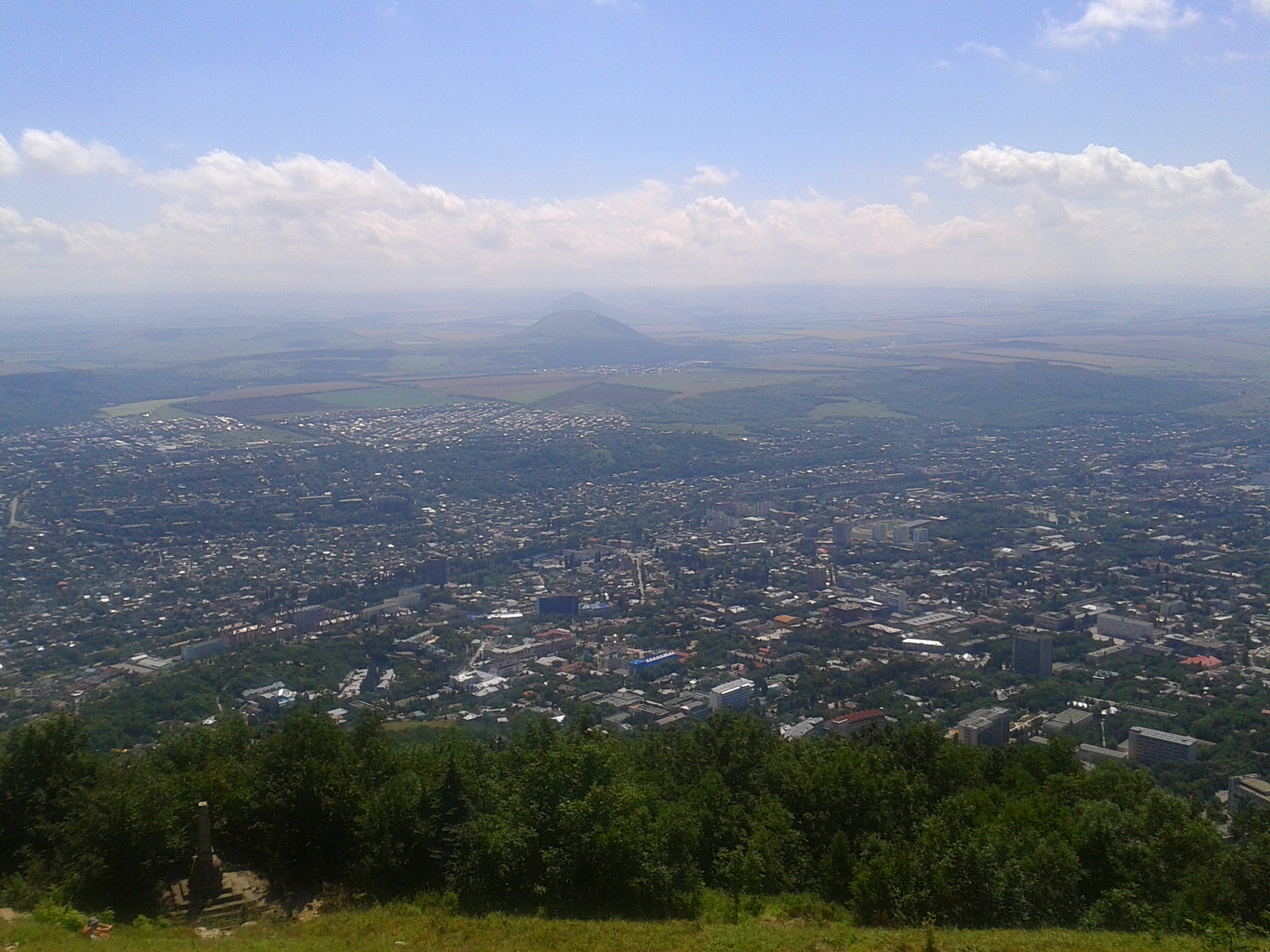 Пятигорск, Пятигорск This image is related to the protected area of Russia number 2600146